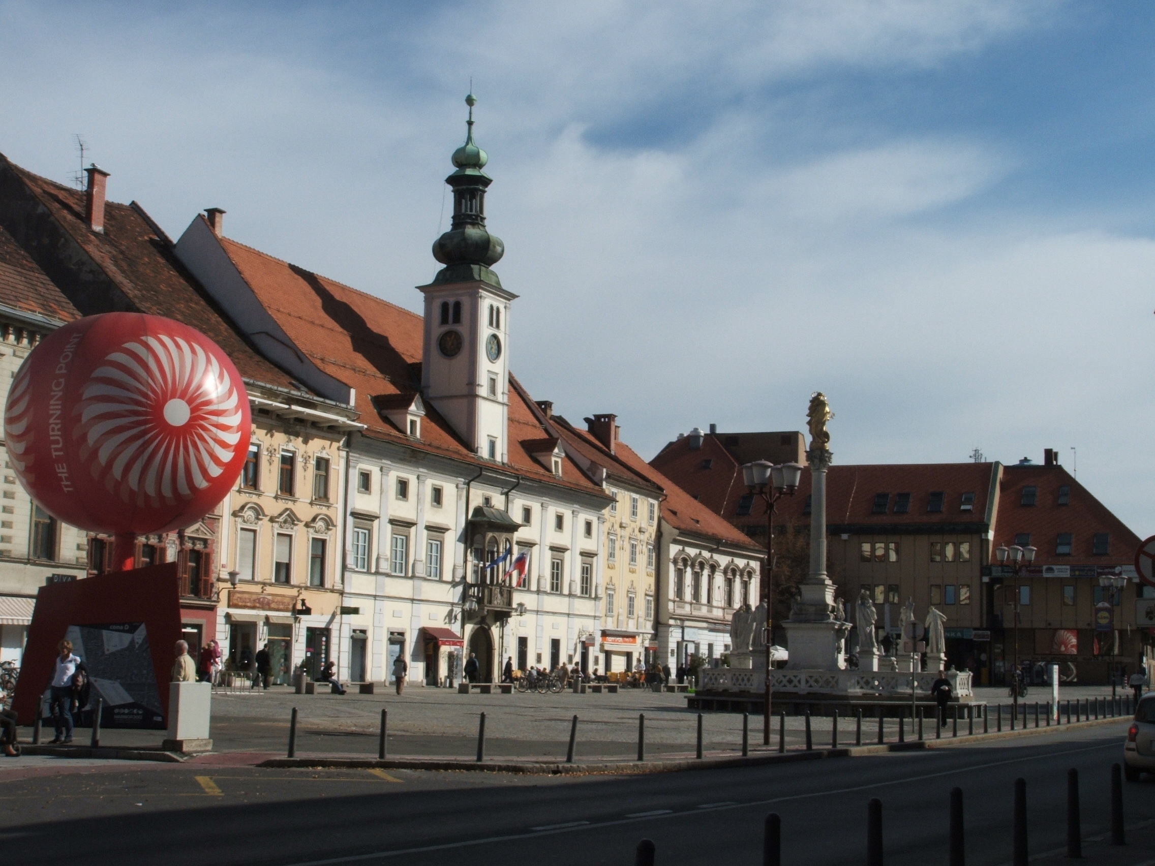 Maribor